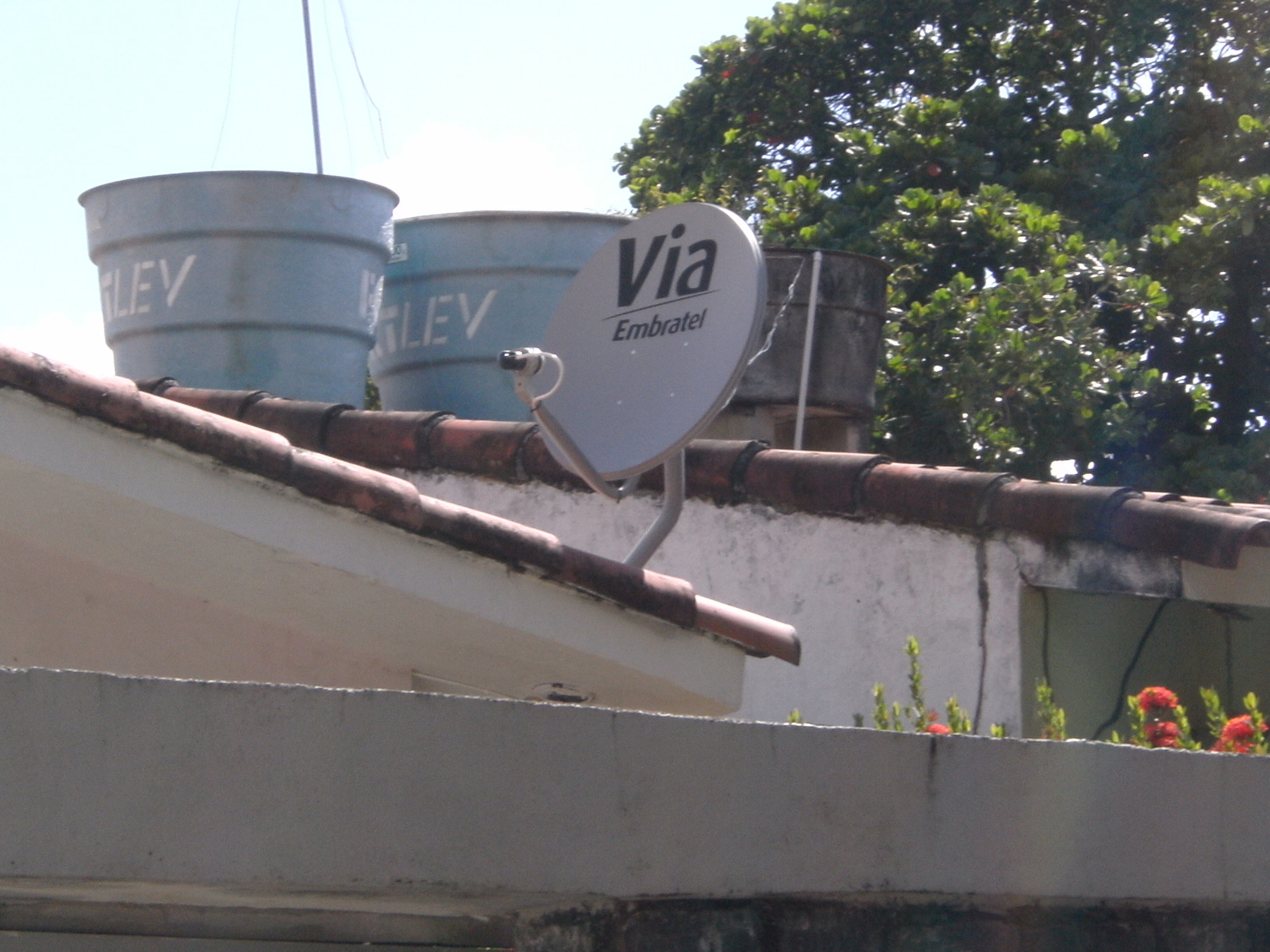 Antena Via Embratel no telhado de uma residência em Jaboatão dos Guararapes, Pernambuco, Brasil.